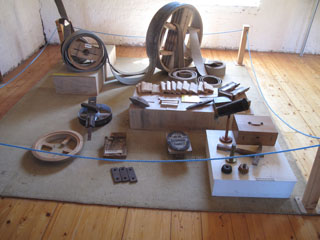 Utställda delar för havregrynsframställning